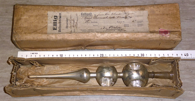 Feldpost-Sendung aus dem ersten Weltkrieg. Bezeichnet: "Eilig Weihnachtsbaum". Paket aus Worms, nach Virton in "Deutsch-Belgien". Vermutlich zu Weihnachten 1914. Die Verpackung ist original, die Christbaumspitze als Inhalt vermutlich neueren Datums. Für einen originalen Inhalt siehe: File:Klappbarer Weihnachtsbaum NIK 7534.JPG